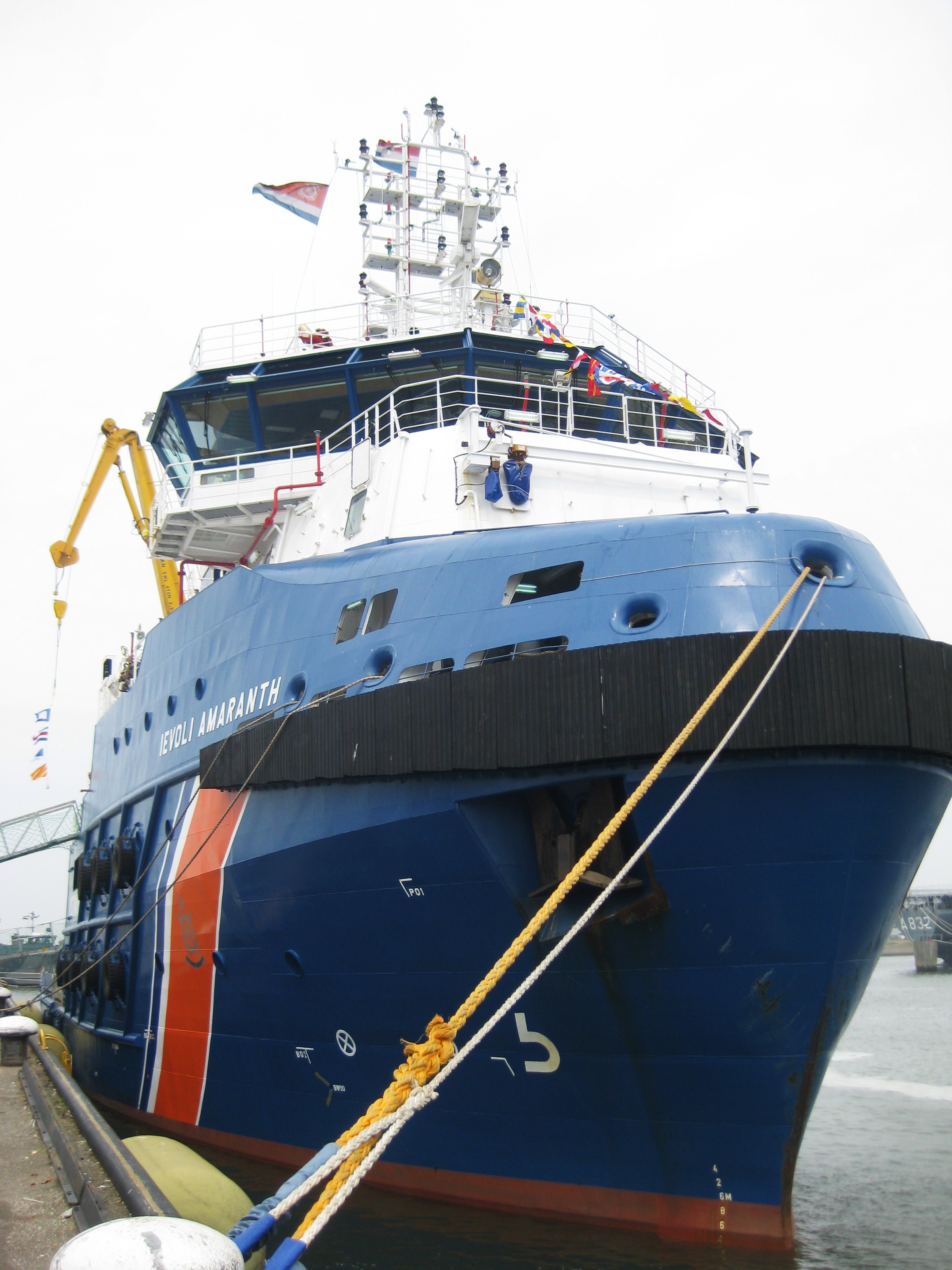 Het Emergency Towing Vessel Ievoli Amaranth . De Ievoli Amaranth wordt gecharterd door het ministerie van Infrastructuur en Milieu, is ondergebracht bij Svitzer Salvage en permanent toegewezen aan de Kustwacht: De taak van de Ievoli Amaranth is het voorkomen van calamiteiten. Geen eigendom van de Rijksrederij, maar deze beheert wel het contract tussen het ministerie van Infrastructuur en Milieu en Svitzer Salvage.